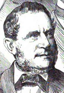 Camillo von Seebach, deutscher Politiker im 19. Jh.